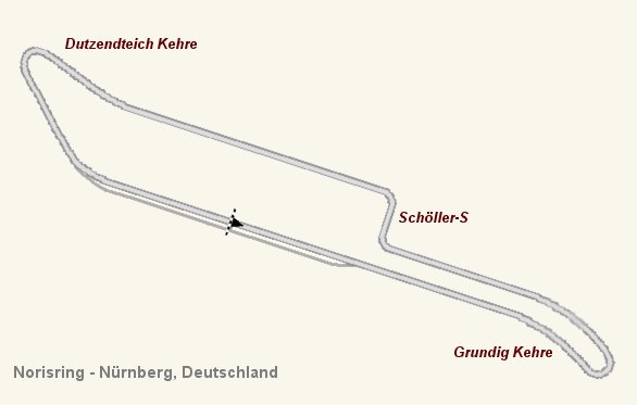 Streckenplan des Norisrings - Nürnberg, Deutschland